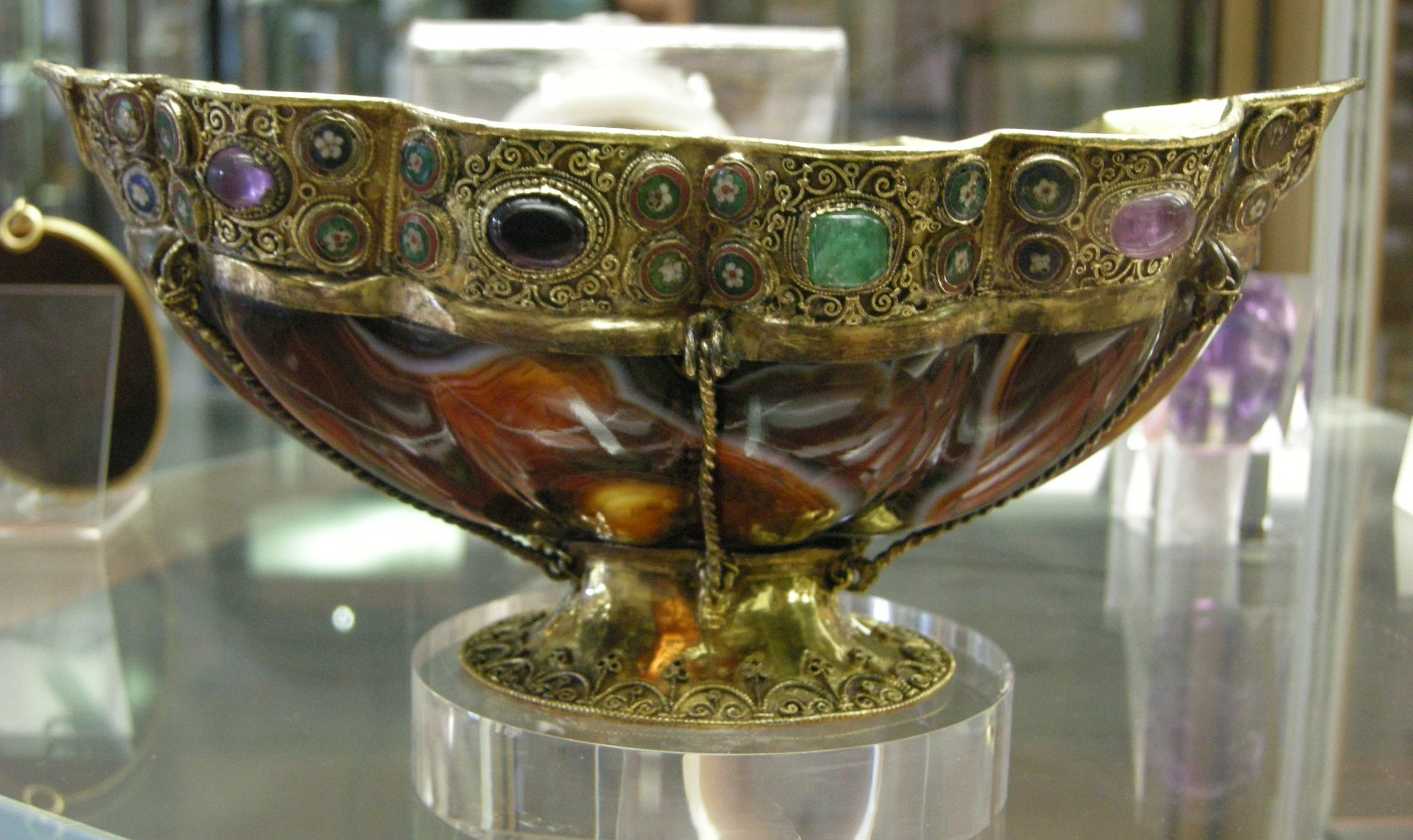 CdM, navetta di saint-denis, IX-X sec., sardonice montata con argento dorato, filigrana, pietre preziose, smalti e vetro rosso, arte ottoniana